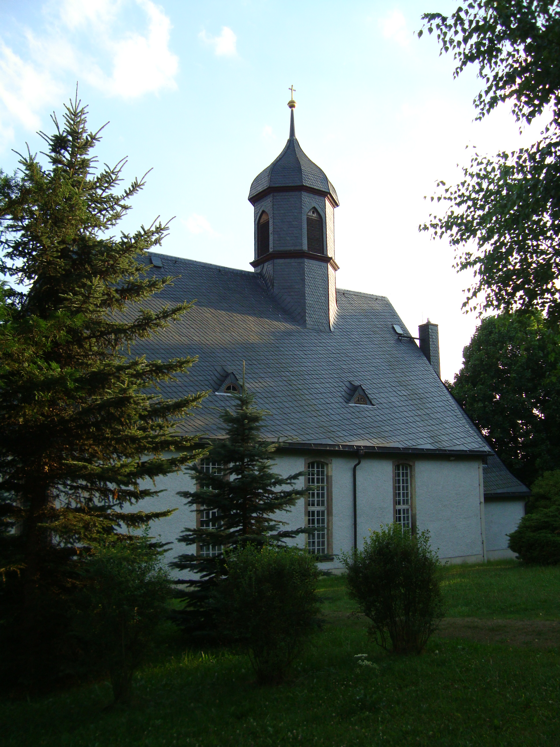 Kirche in Leukersdorf im Erzgebirge